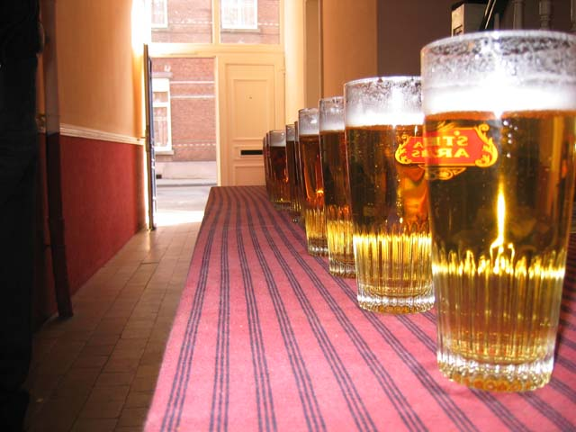 Gefüllte Biergläser für eine Abschlußstafette beim Corps Flaminea Löwen